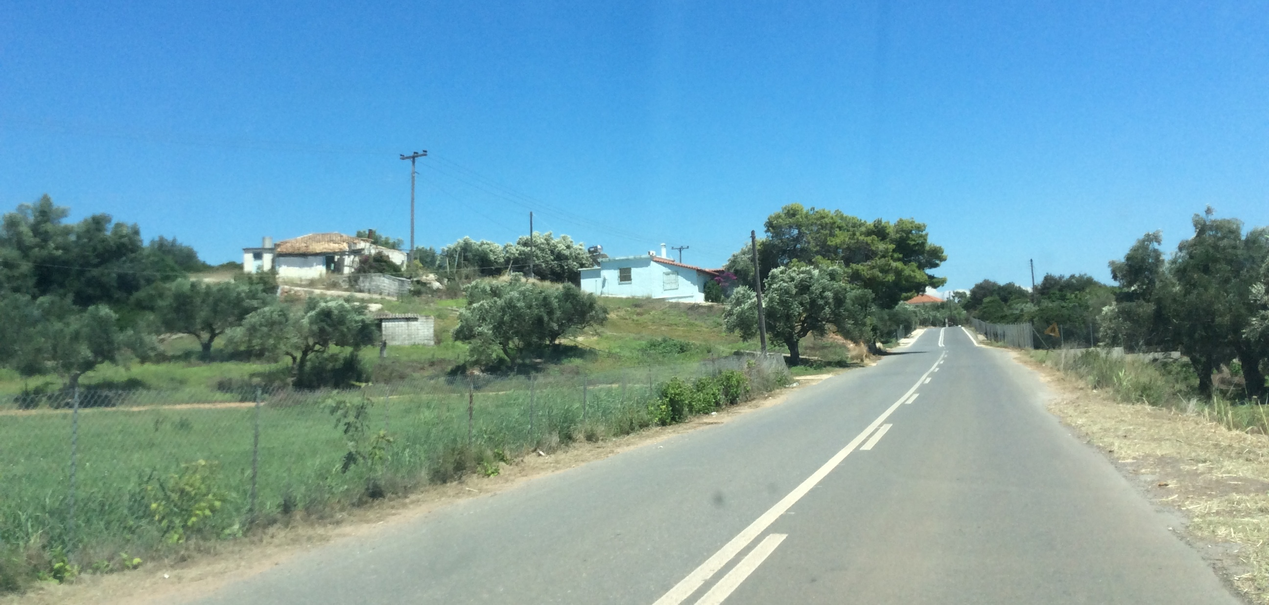 Κοκκινοχώραφα Μεσσηνίας - Άποψη του οικισμού από τα νοτιοδυτικά.